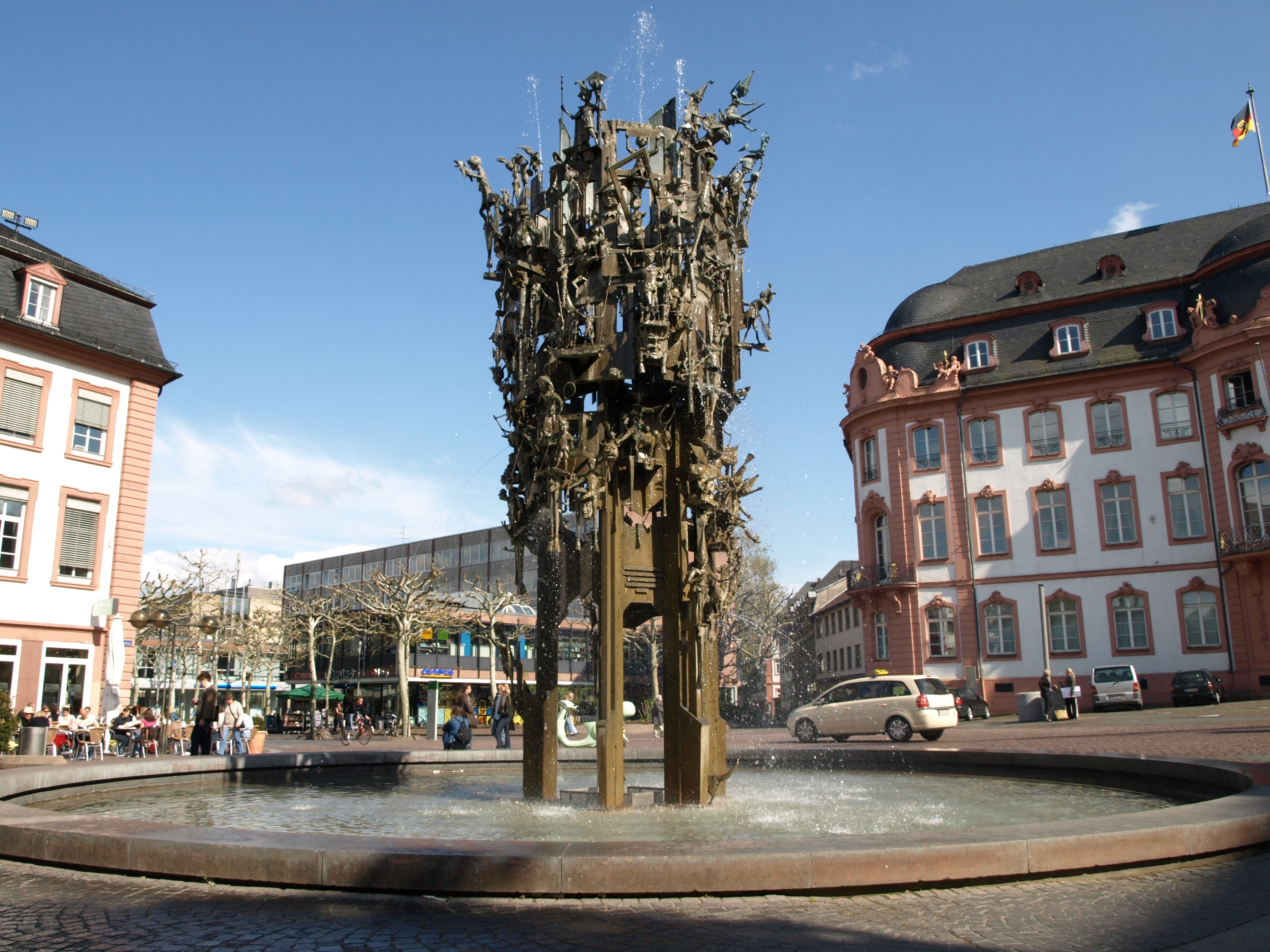 Der Mainzer Fastnachtsbrunnen